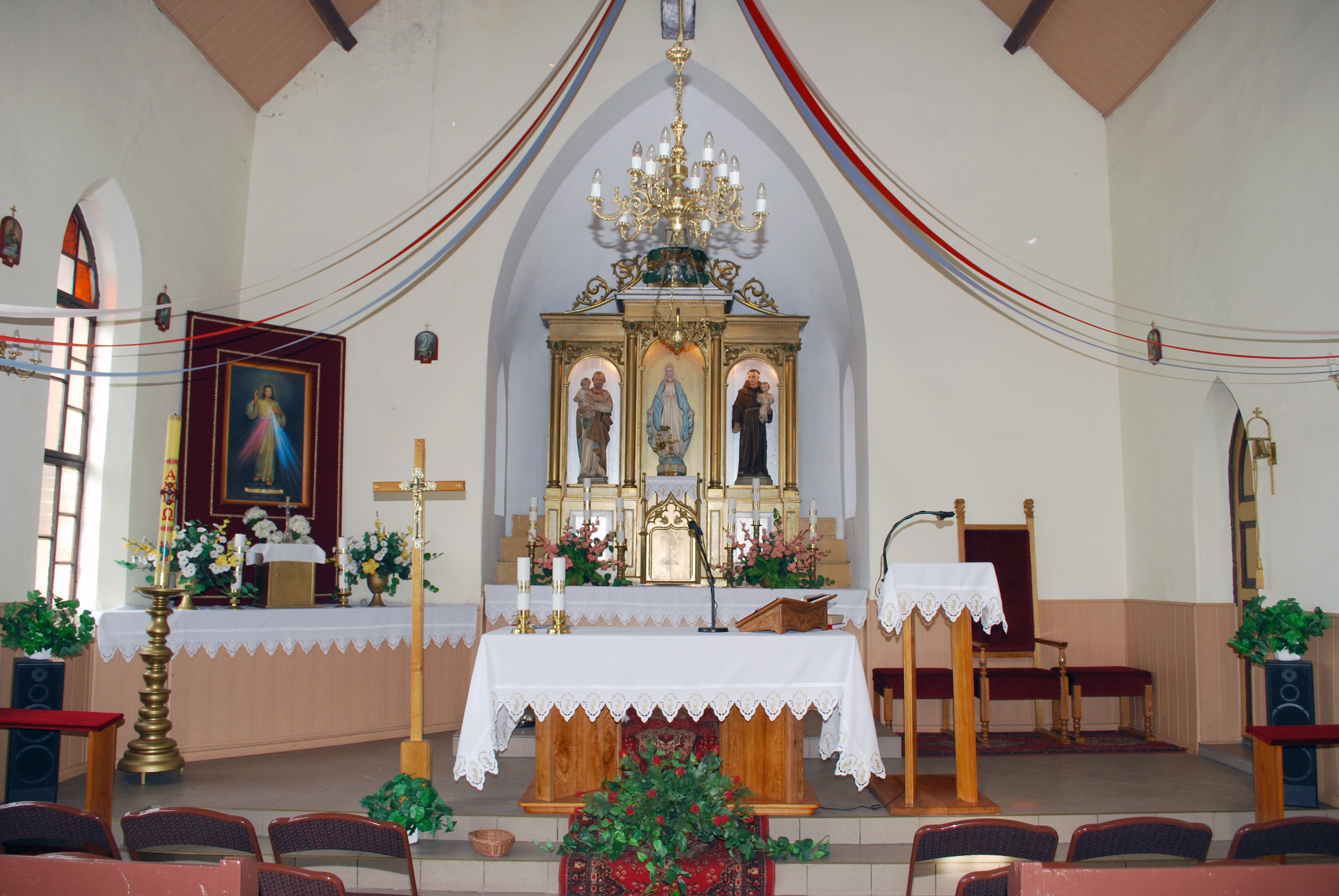 Kościół polsko-katolicki Tolkmicku, wnętrze.